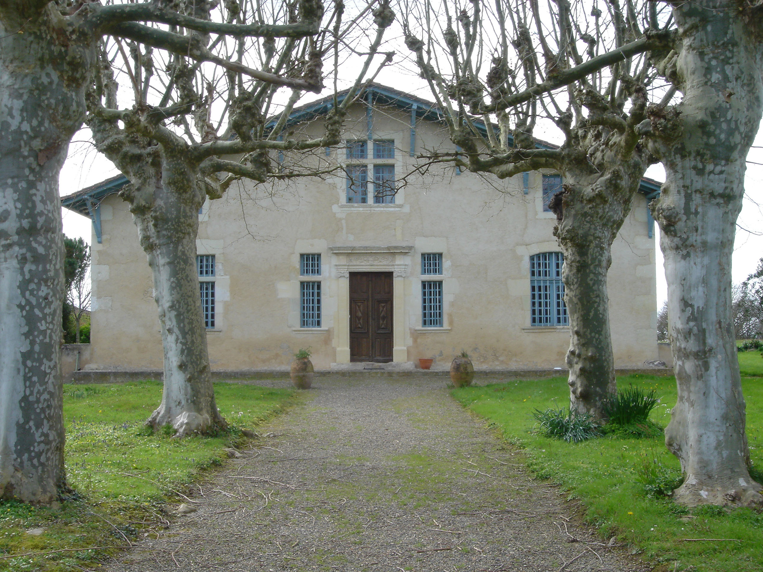 Maison Peyne à Laurède (40)